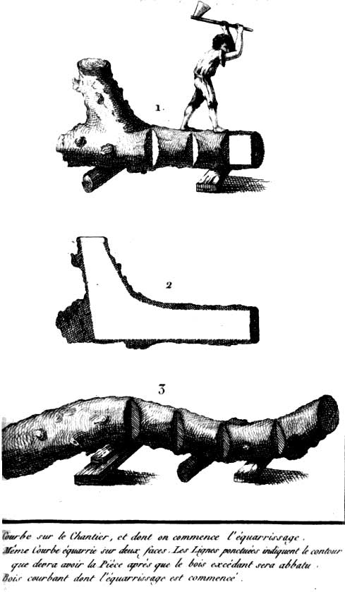 Louis Joseph Marie Achille Goujon, Des bois propres aux constructions navales, manuel à l'usage des agents forestiers et maritimes. 1807. Darena, graveur. Planche qui figurent les bois sur pied, sous les différentes formes qu'ils ont reçu de la nature, qui les rendent propres à l'usage de la marine